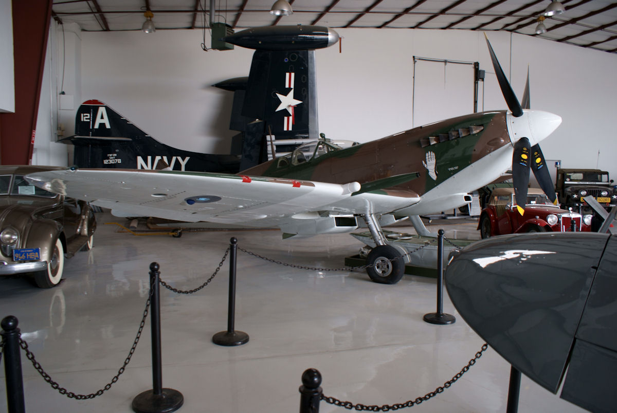 Spitfire LF Mk.VIIIc MT719 SONY DSC